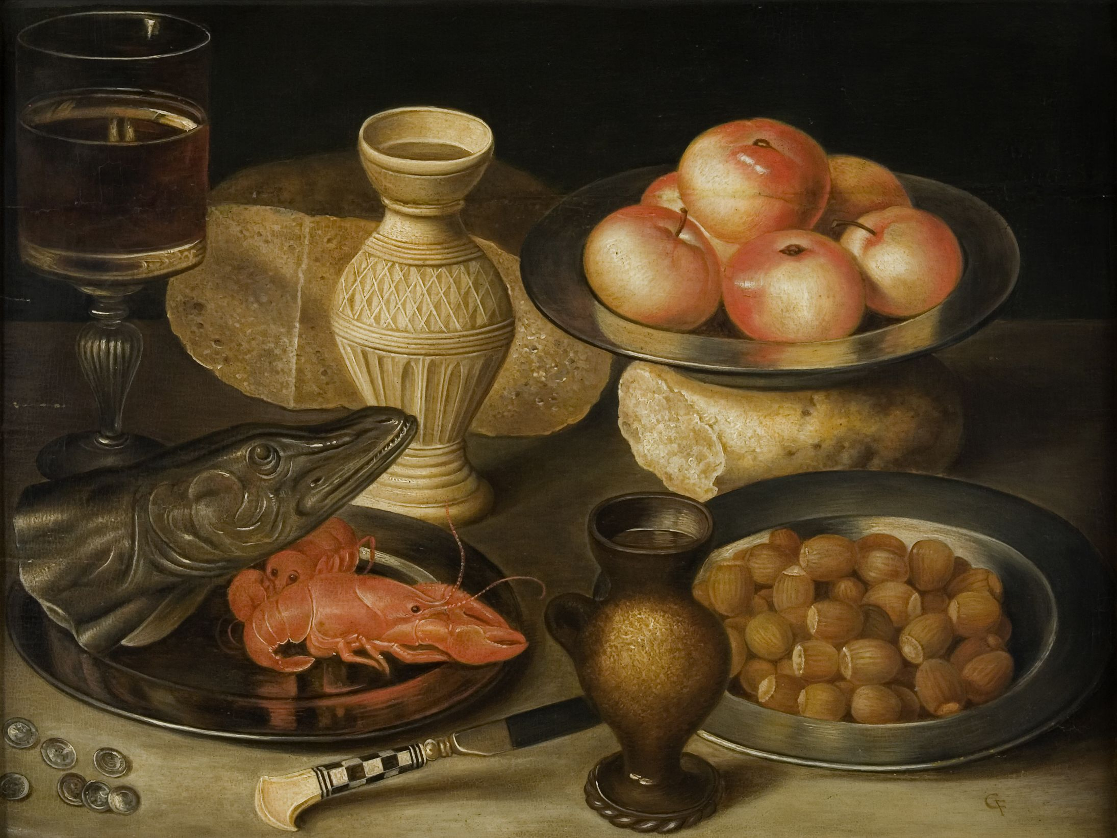 Stilleben mit Siegburger Steinzeugkrug, Glas, Messer, zwei Broten, drei Zinntellern mit Haselnüssen, Meerestieren und Äpfeln. Öl auf Holz. 31 x 41 cm. Unten rechts monogrammiert.